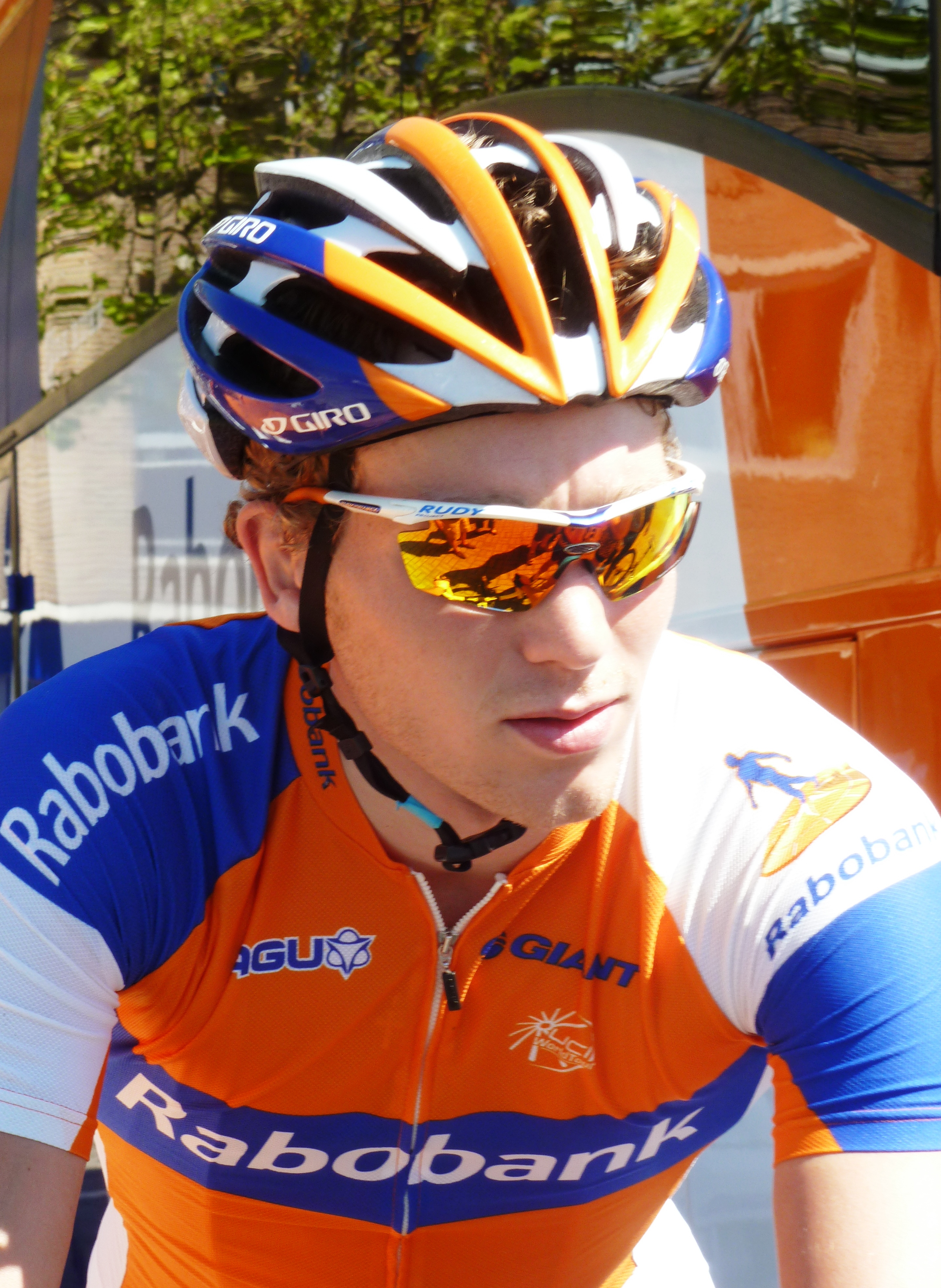 Coen Vermeltfoort, niederländischer Radrennfahrer, bei der Belgien-Rundfahrt 2012, vor dem Start zur 3. Etappe in Heist